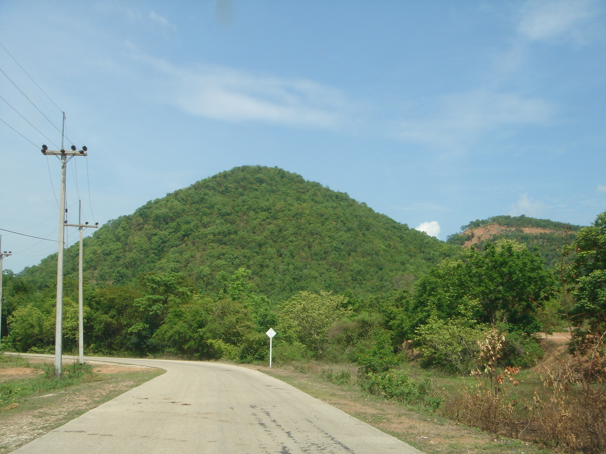 เขาชนไก่